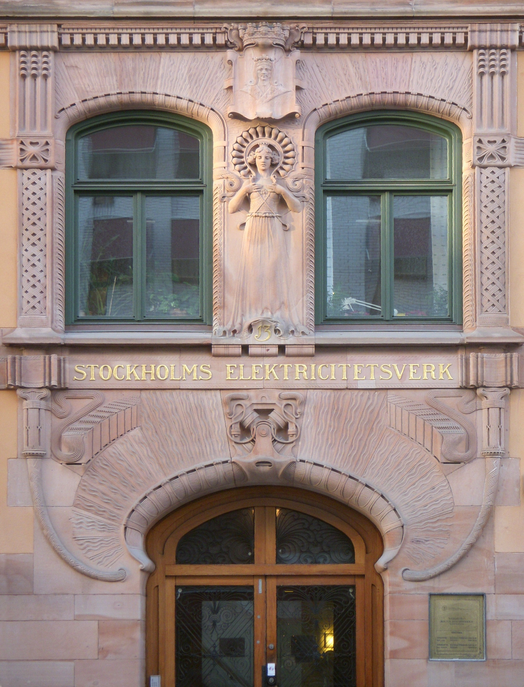 Huvudentré till Tulestationen i Stockholm, Tulegatan 13. Det föll just en solstråle på kvinnofiguren, då blir man glad som fotograf